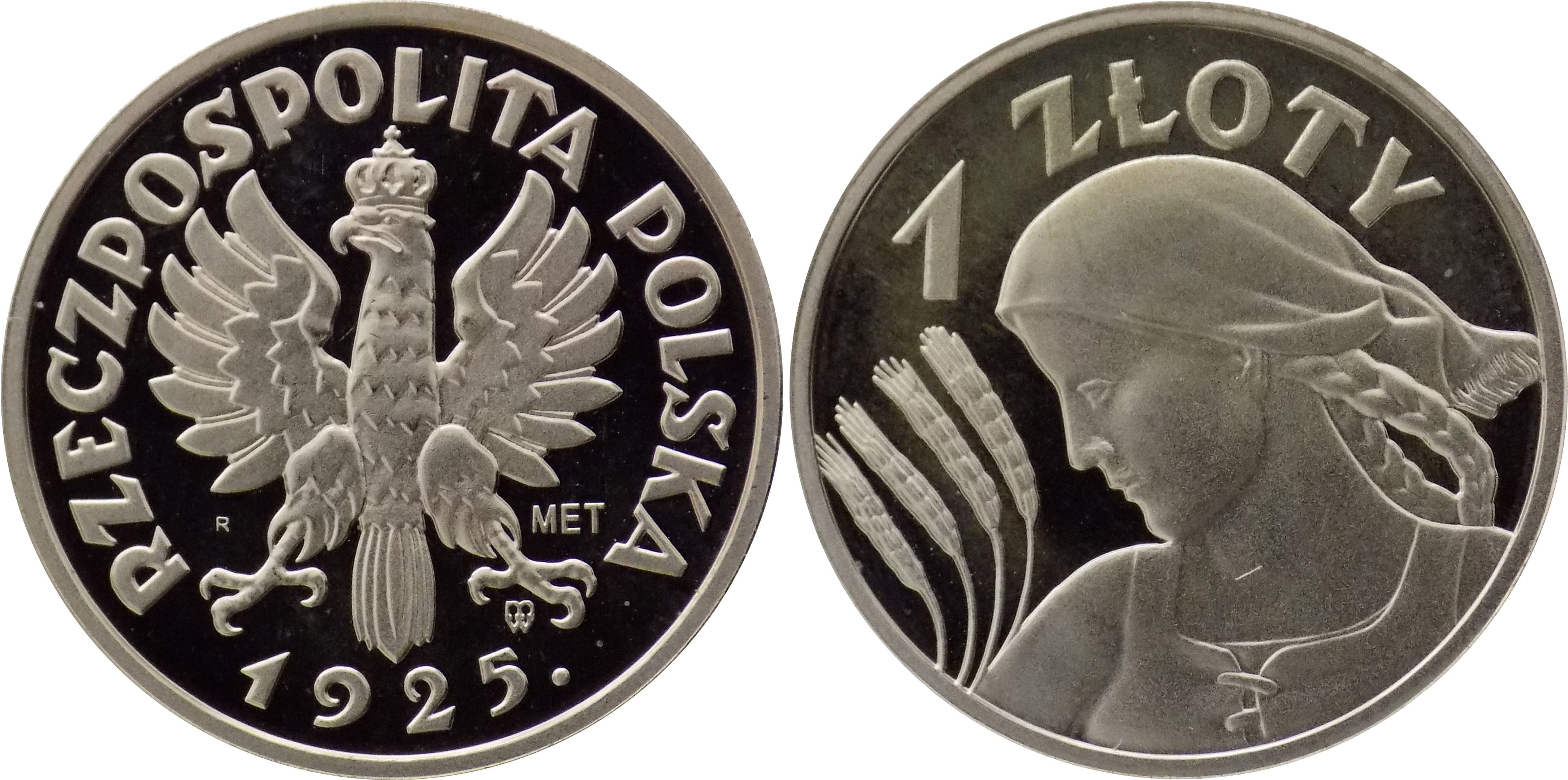 Replika 1 złoty 1925 CuNi